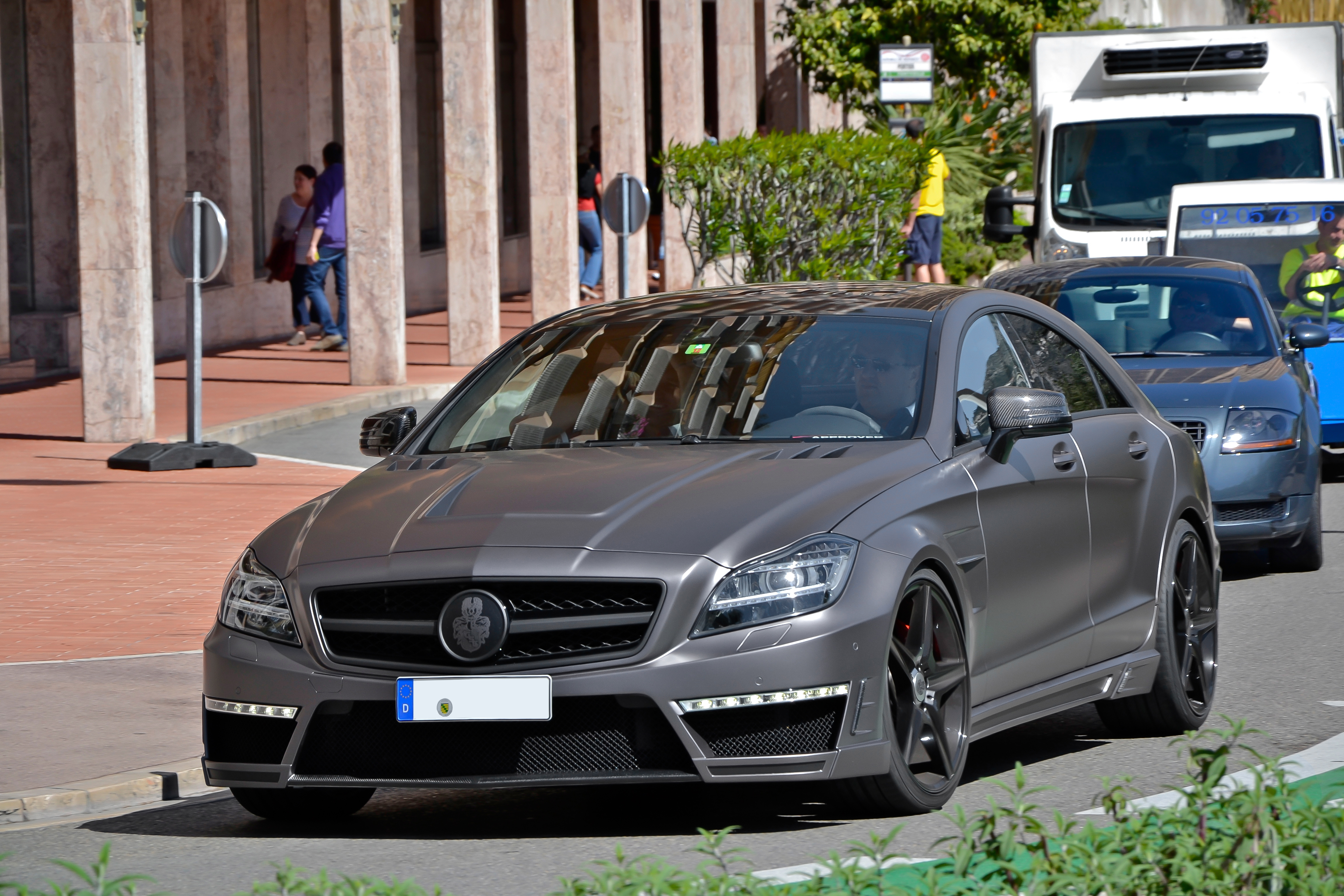 Mercedes-Benz CLS63 AMG Stealth